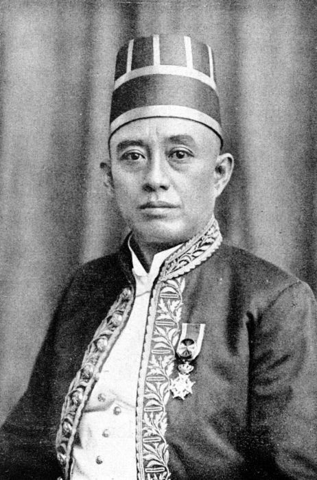 Repronegatief. Portret van Adipati Ario Achmad Djajadiningrat